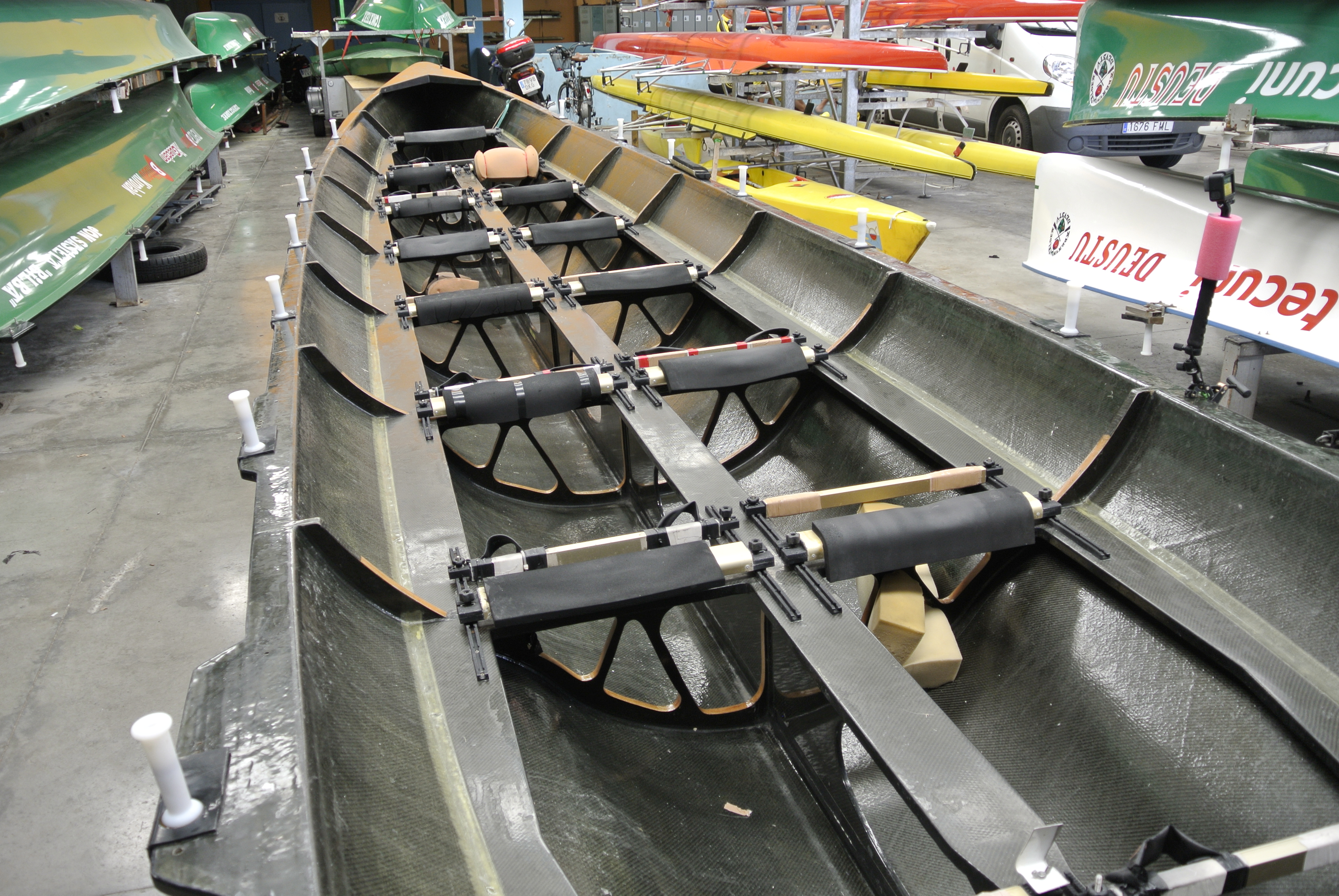 Trainera de Deustu Arraun Taldea